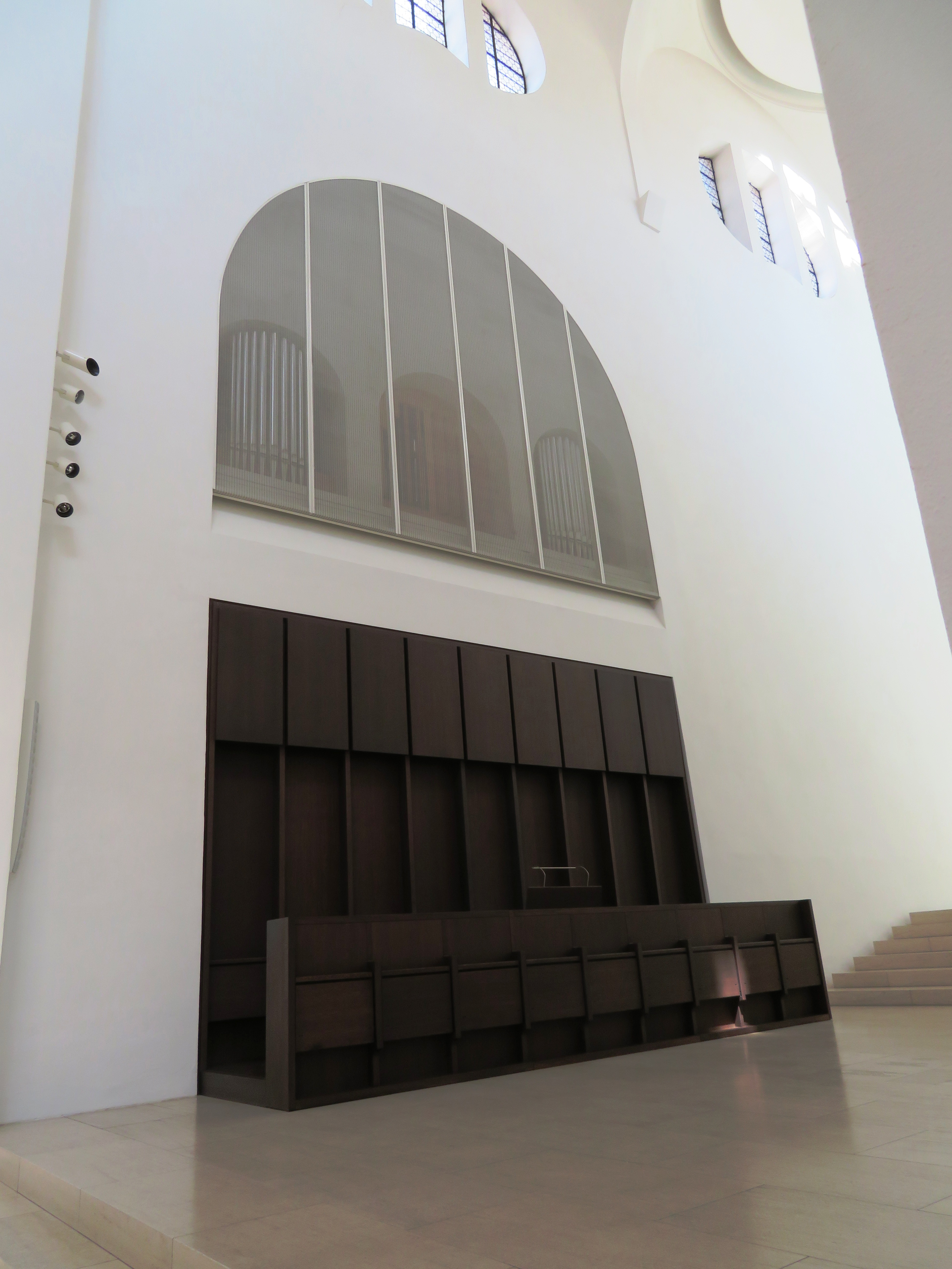 St. Moritz (Augsburg), Chororgel Fa. Kuhn (2013)